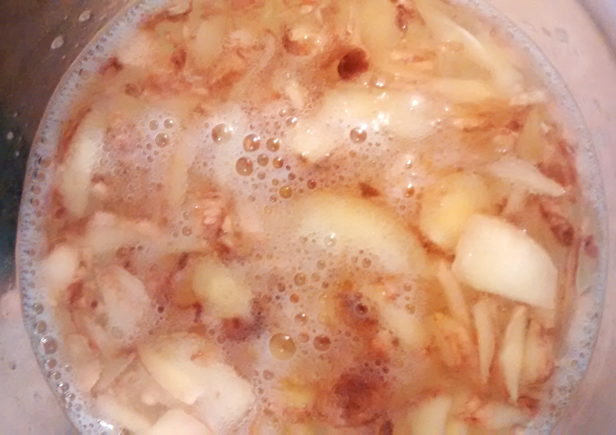 Ginger bug (mix of ginger, sugar and water) after 3 days of fermentation